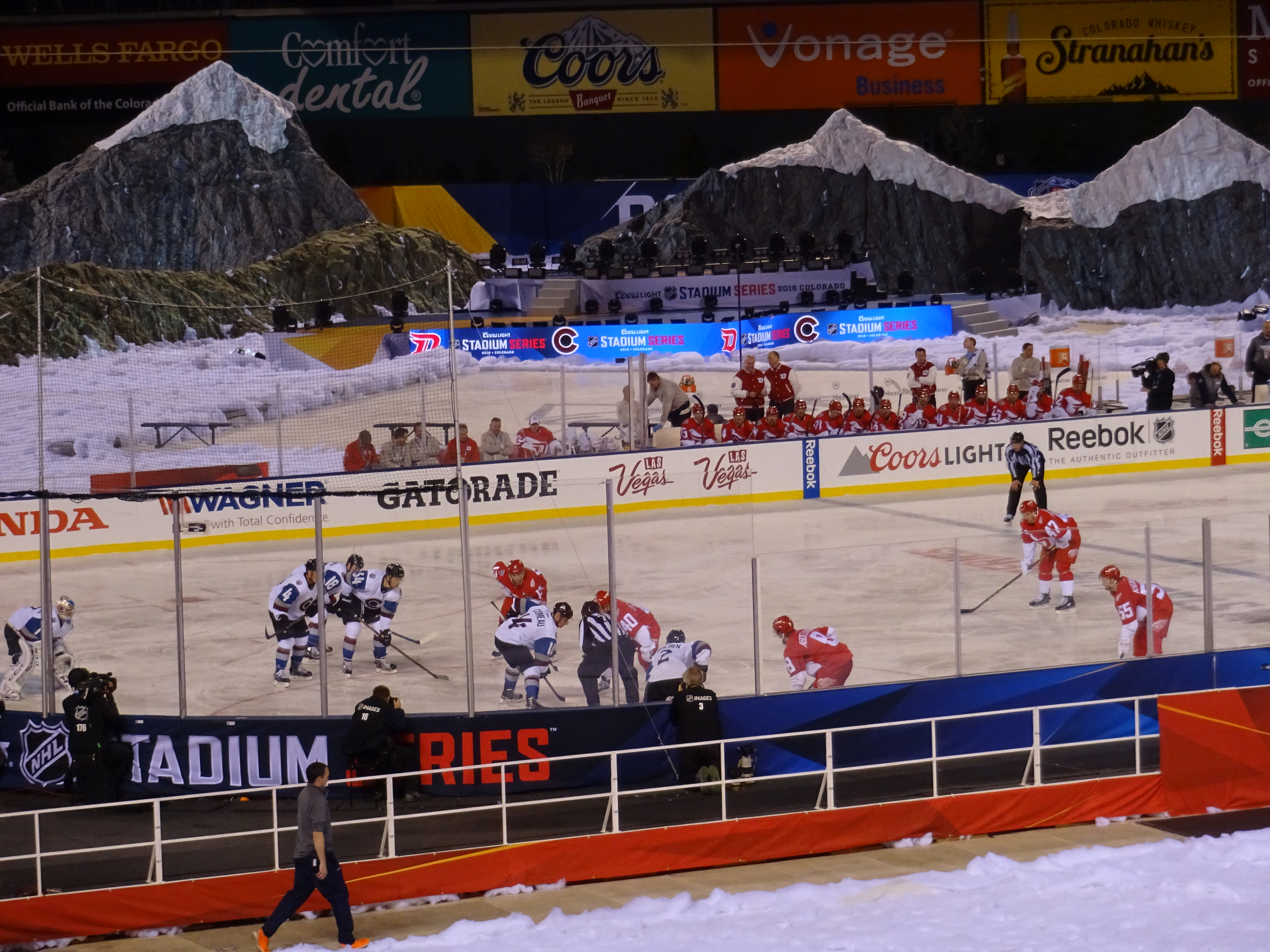 Det @ Col , 27-Feb-2016